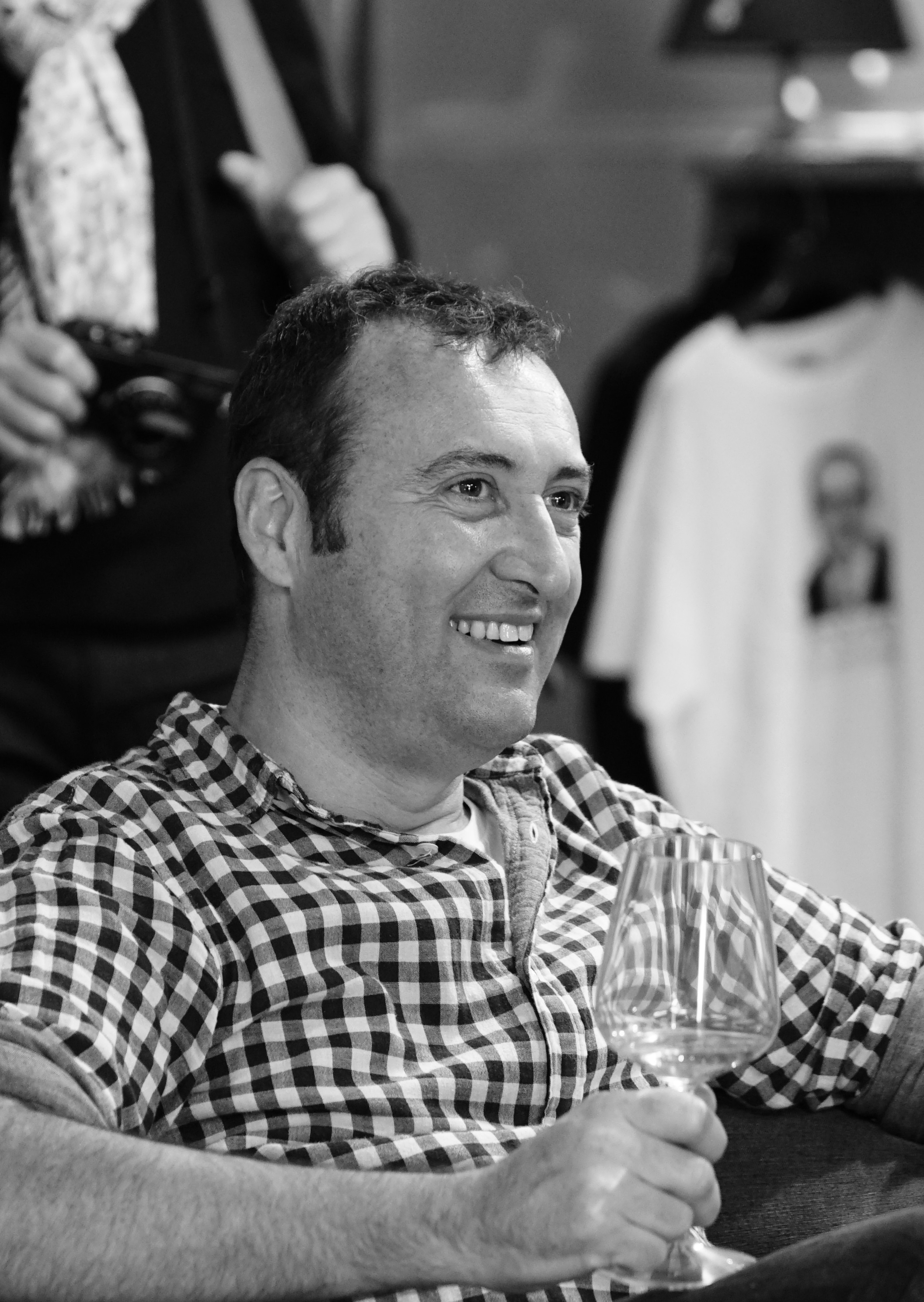 emission Open Jazz en direct du St-exupery pendant le festival Sunnyside.